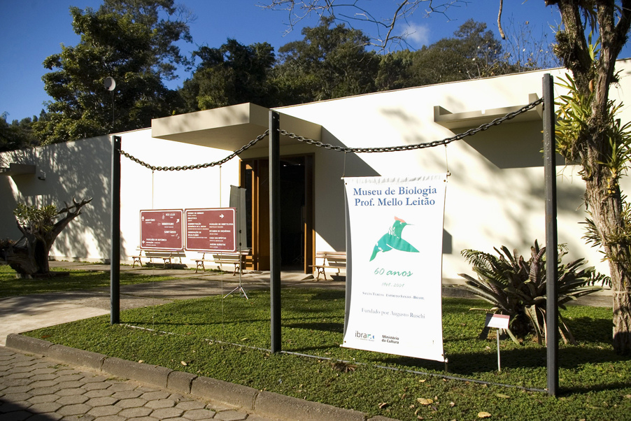 Endereço: Avenida José Ruschi, 4 – Centro – Santa Teresa – ES Tel: +55 (27) 3259-1182 Horários: De terça a domingo, das 8h às 17h Foto: Divulgação IBRAM migre.me/cJCxT